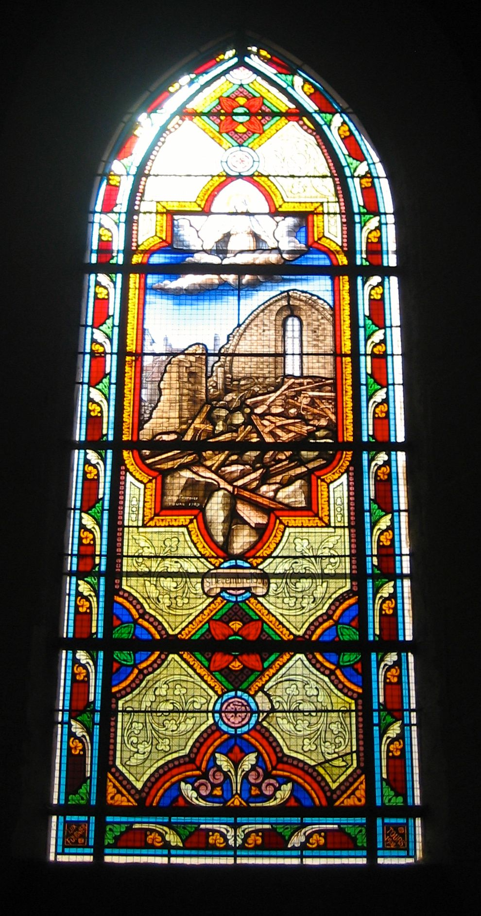 Église Saint-Germain de La Châtre. Vitrail de l'écroulement du clocher en 1896